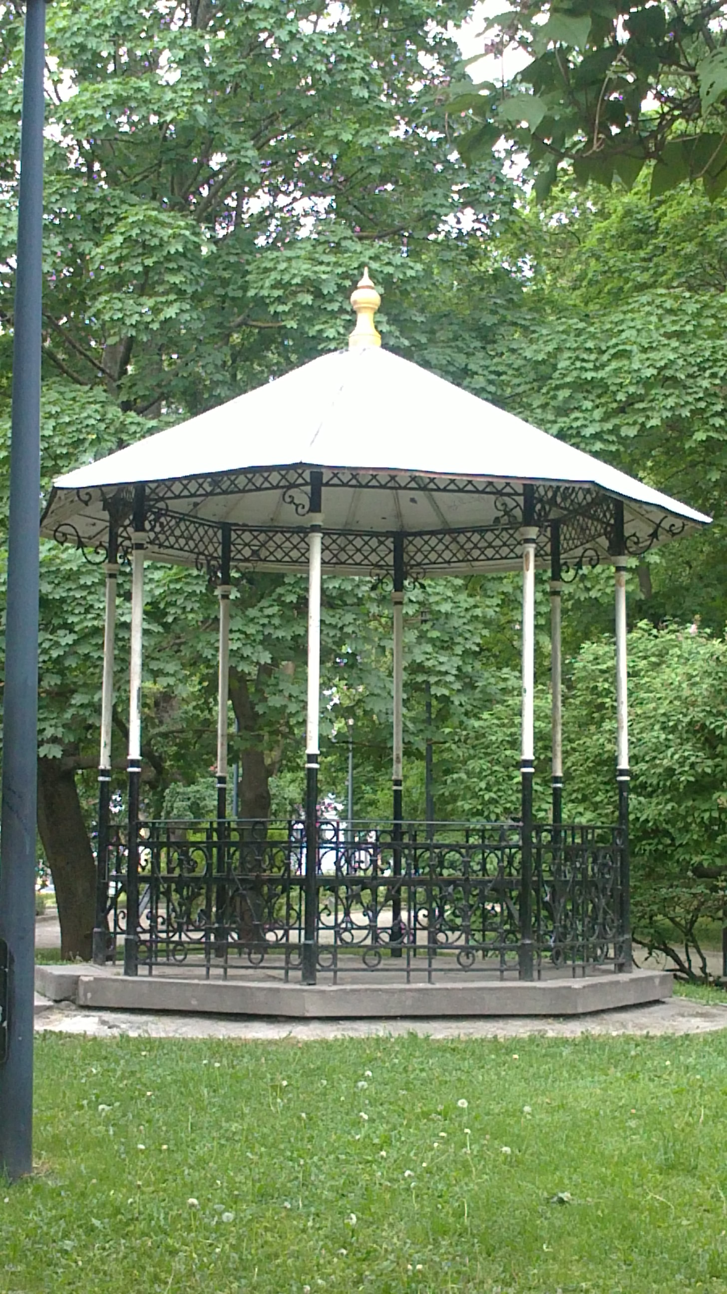 Tallinna kesklinnas asuva Virumäe suvepaviljon